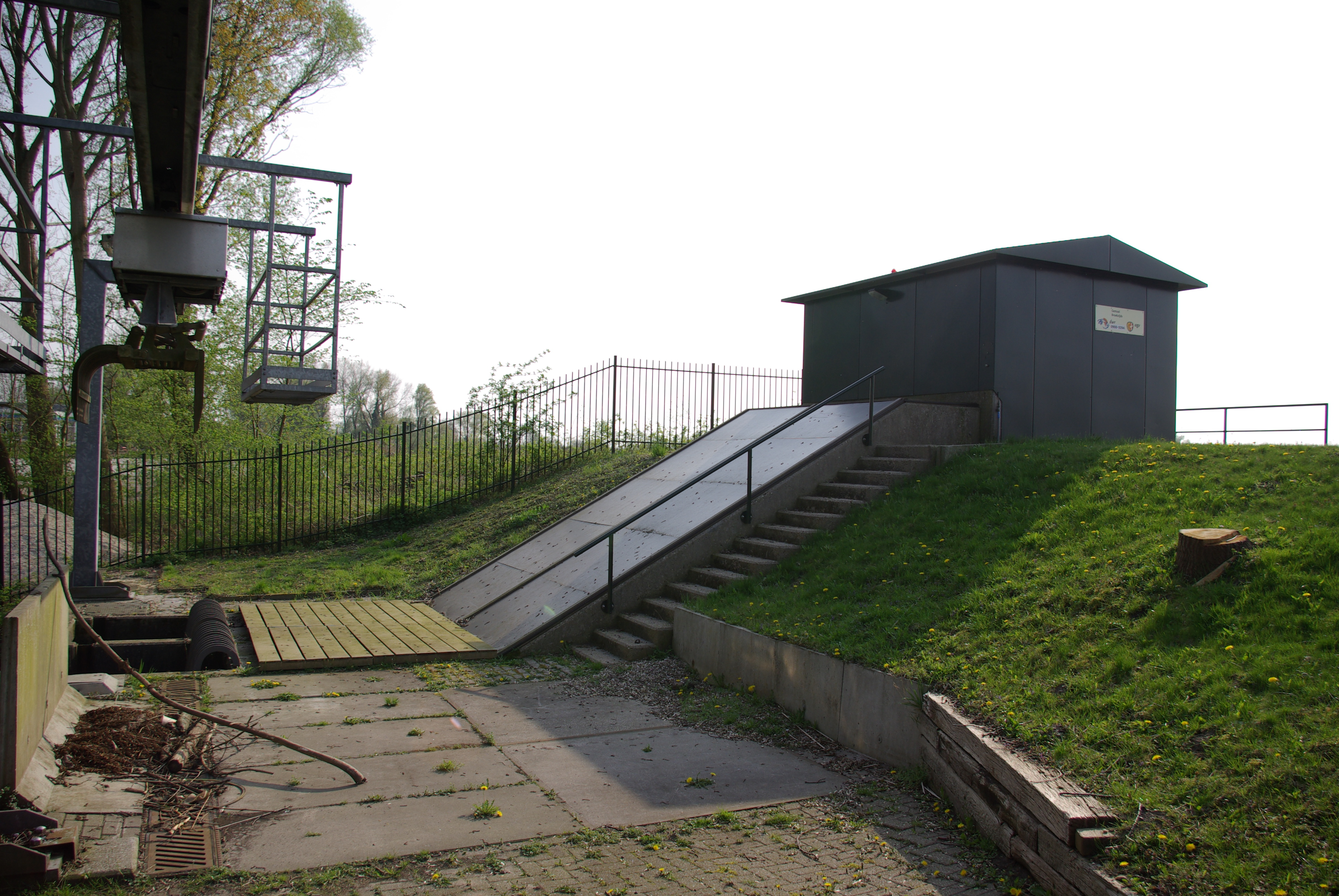 Gemaal Broekzijds, Abcoudermeer, Provincie Utrecht